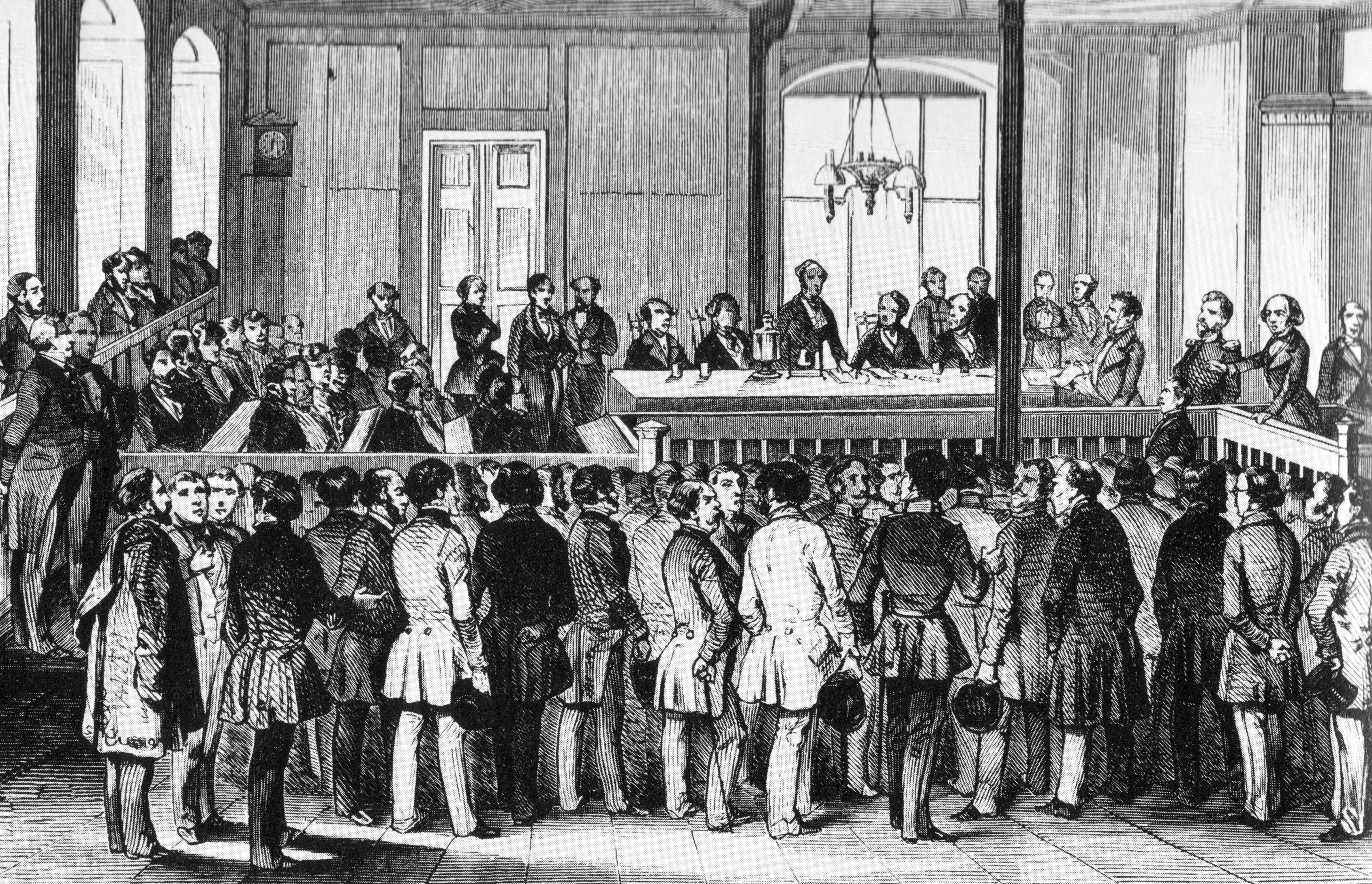 Geschworenenprozeß gegen Johann Jacoby, Dezember 1850.